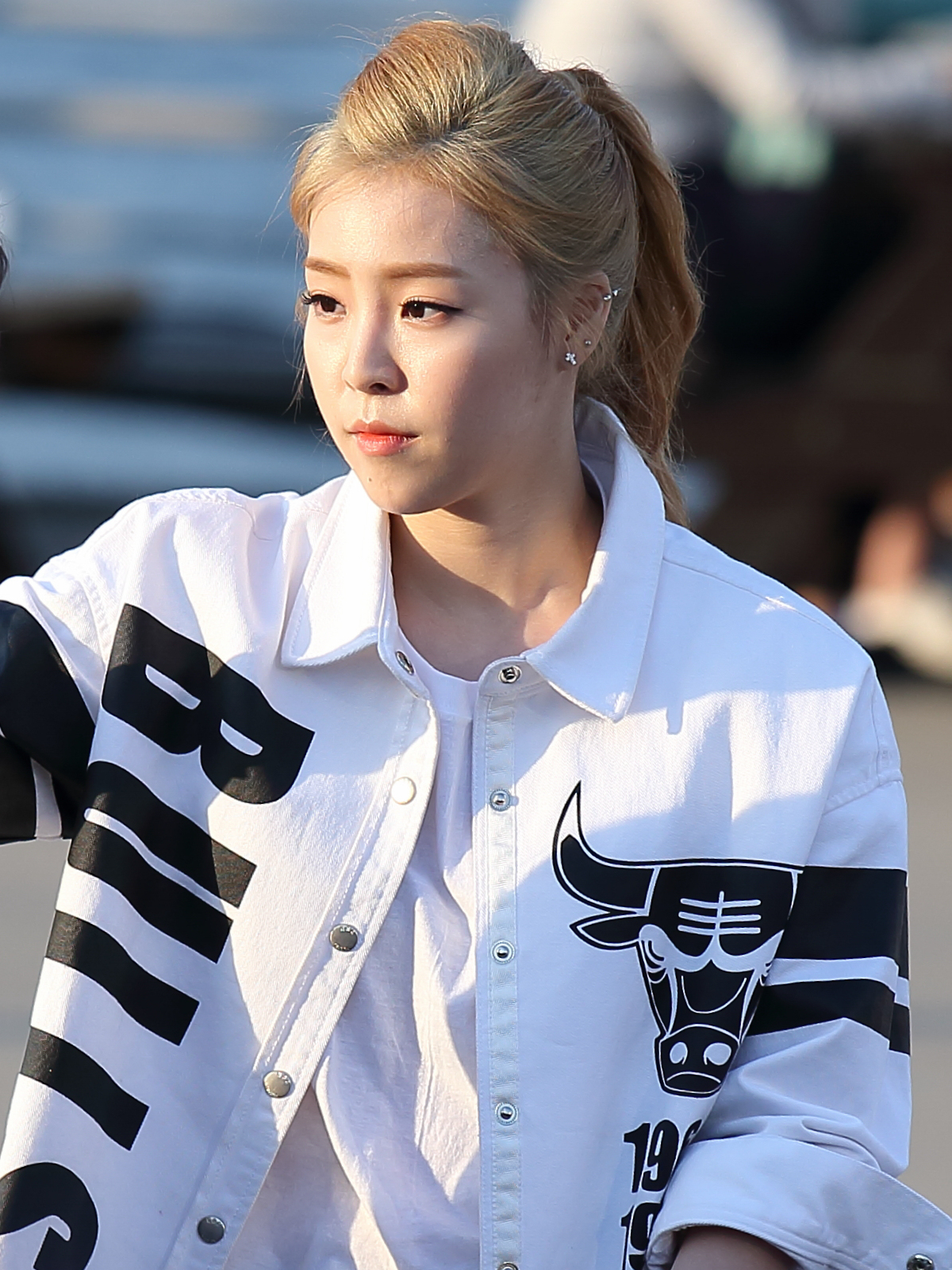 150516 여의도한강공원 버스킹 직찍